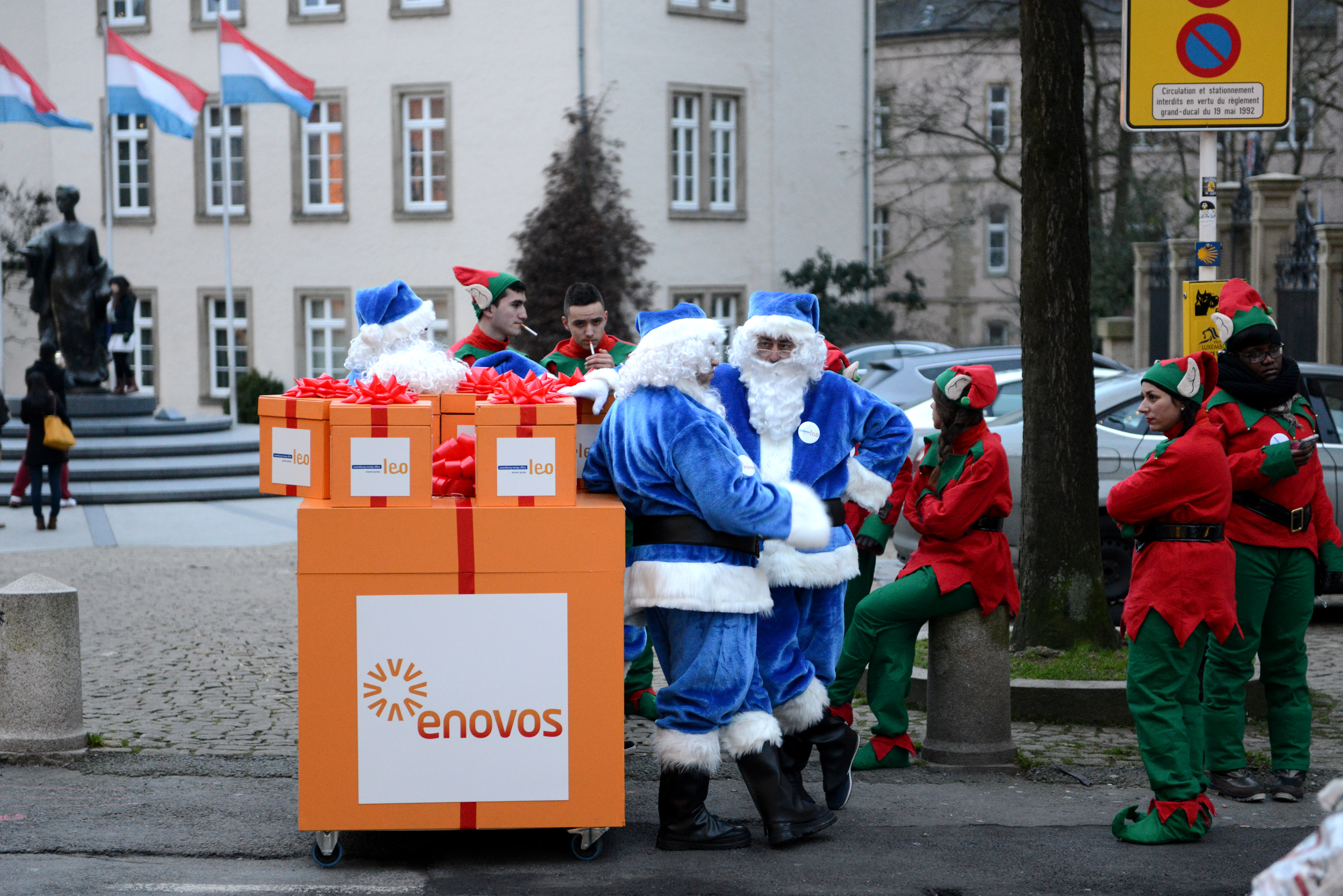 Blo Weihnachtsmänner vun der Enovos op der Clairefontaine-Plaz.